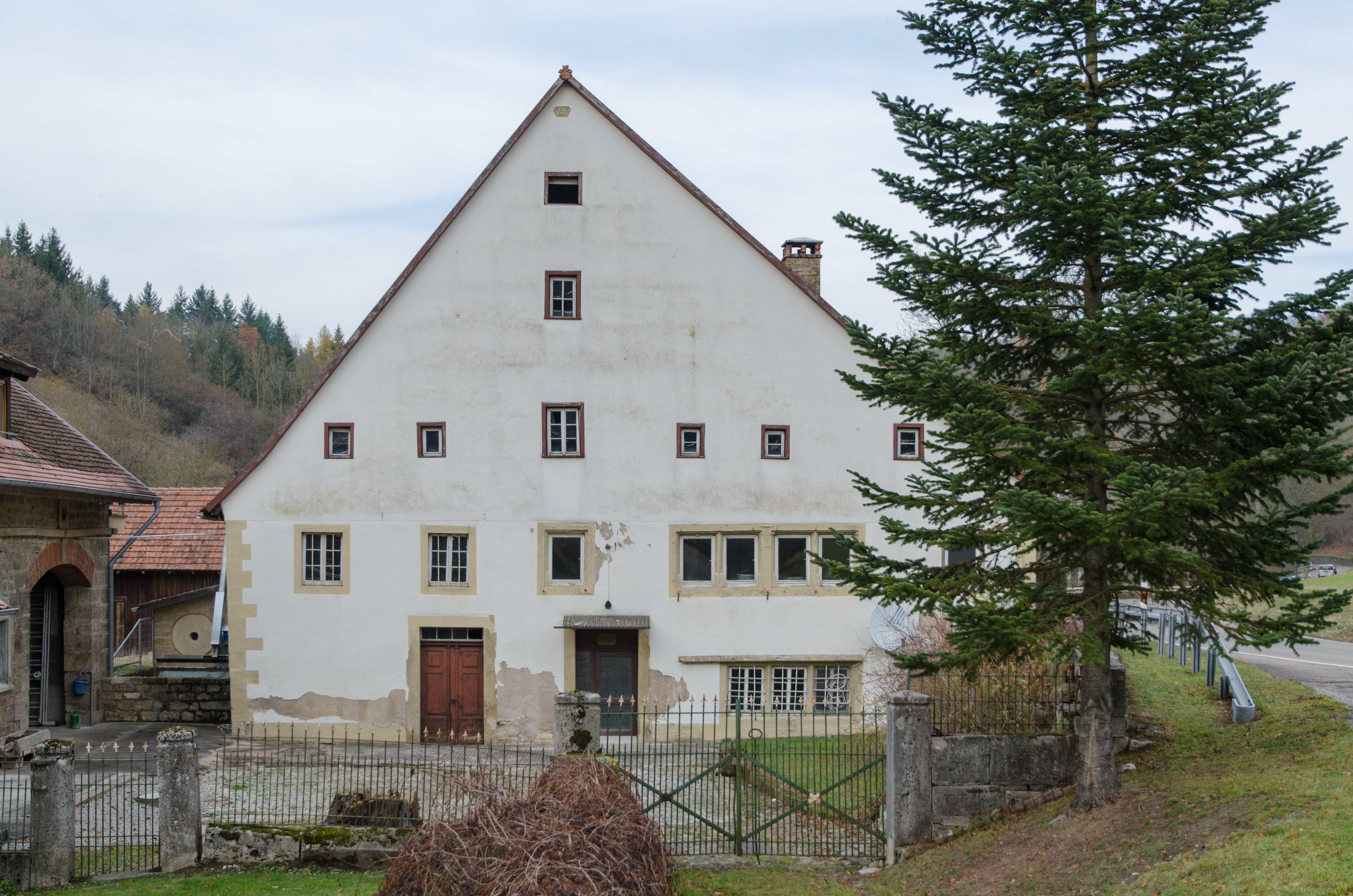 Rothenburg ob der Tauber, Creglinger Straße 1, Wohnhaus